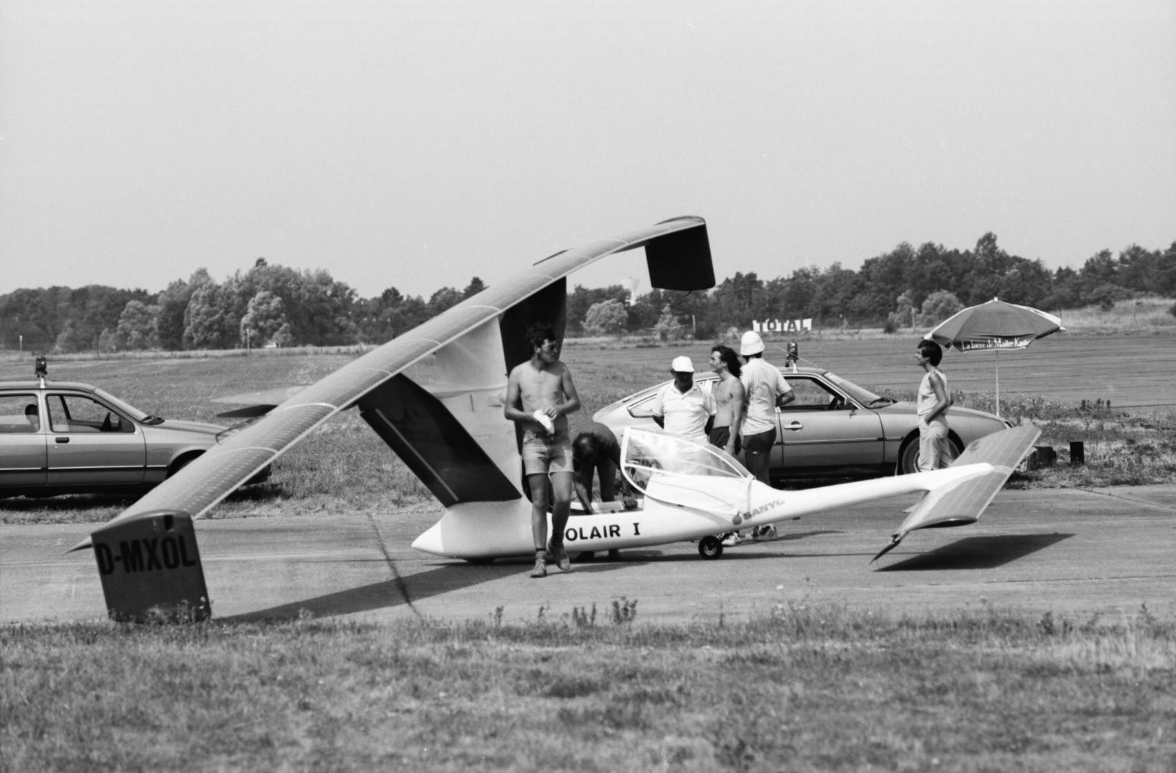 Solair I